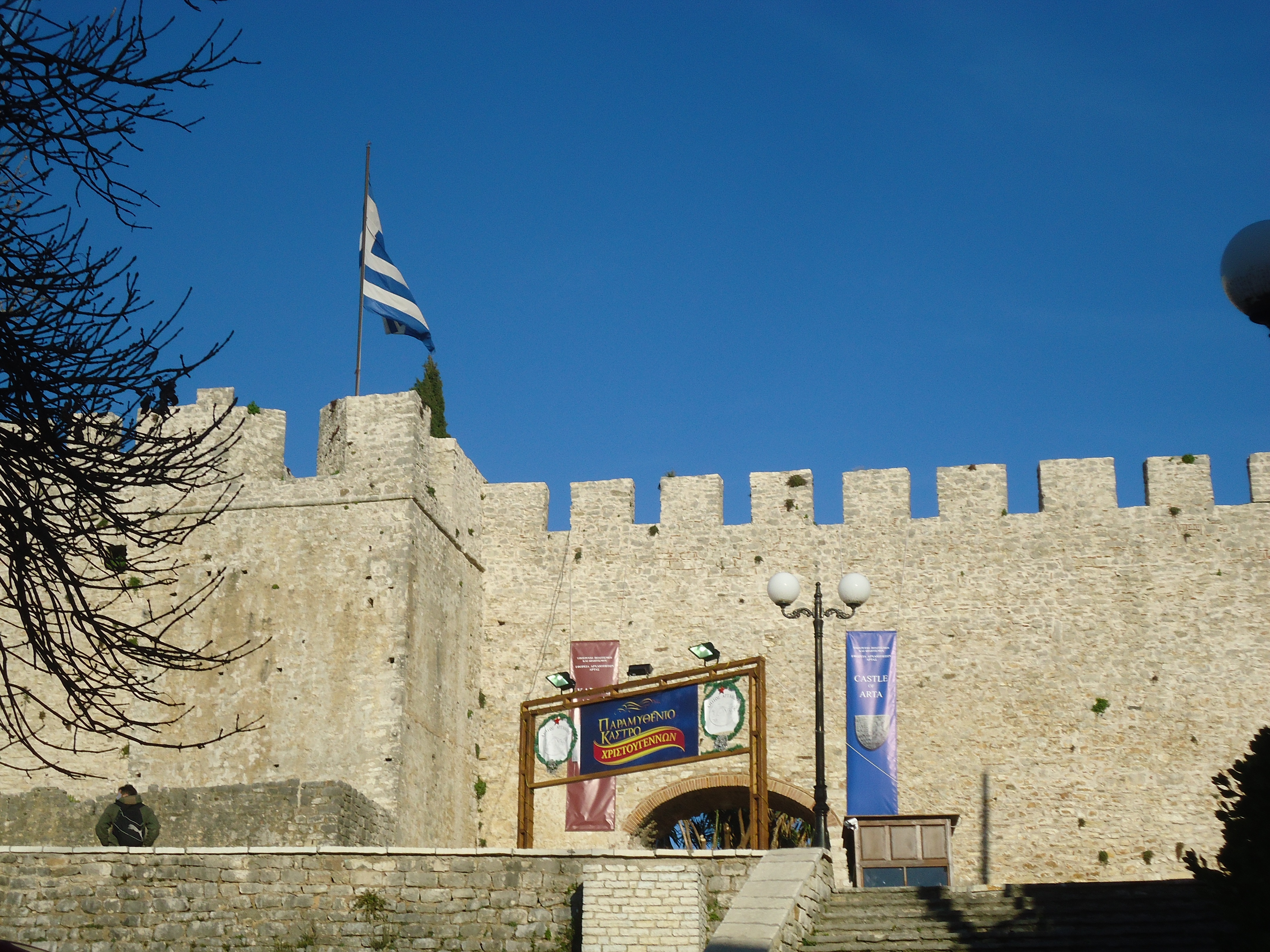 Το Κάστρο της Άρτας.